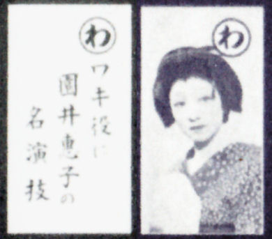 宝塚グラフ1937年12月迎春号「宝塚いろは歌留多」より園井恵子